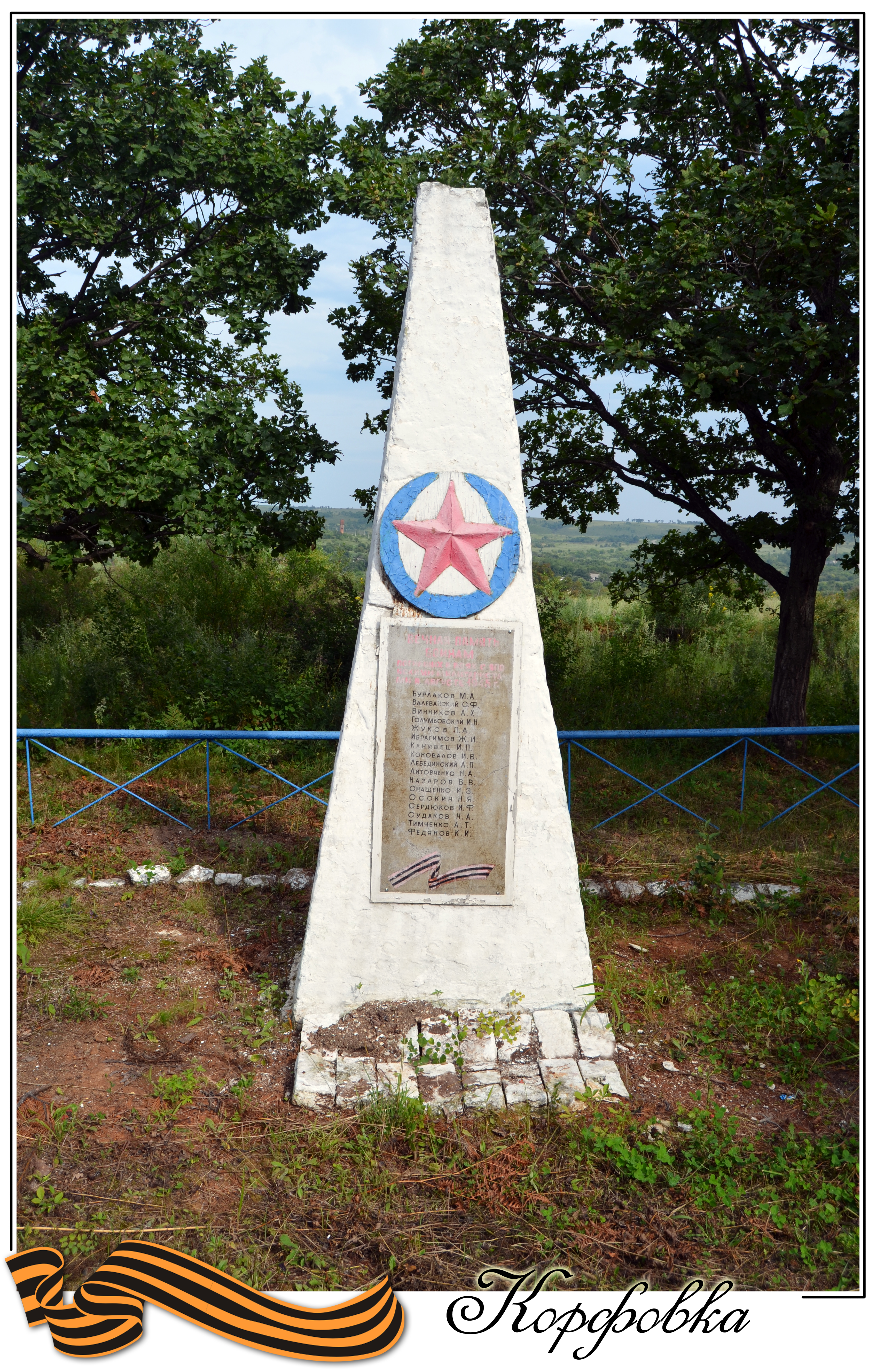 Памятник погибшим однополчанам, установленный в 1945 г.